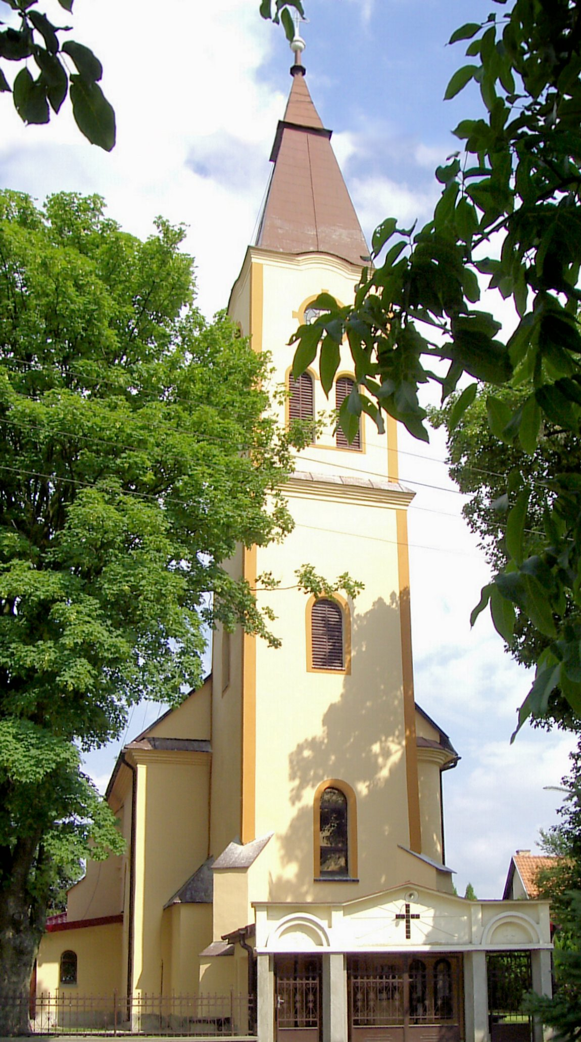 Sačurov, Rímskokatolícky kostol